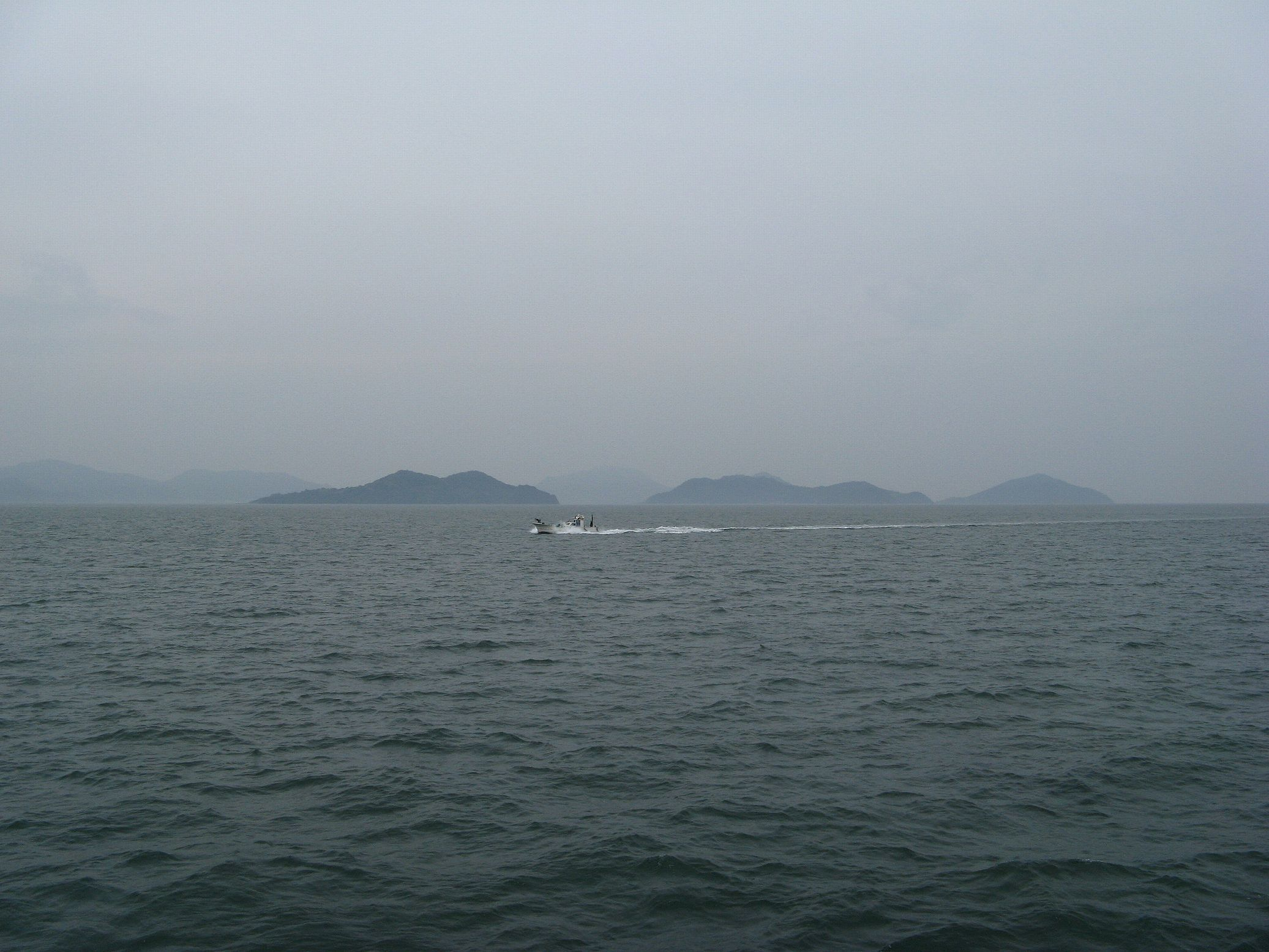 塩飽諸島の粟島（右の2峰）と志々島 三洋汽船から西望